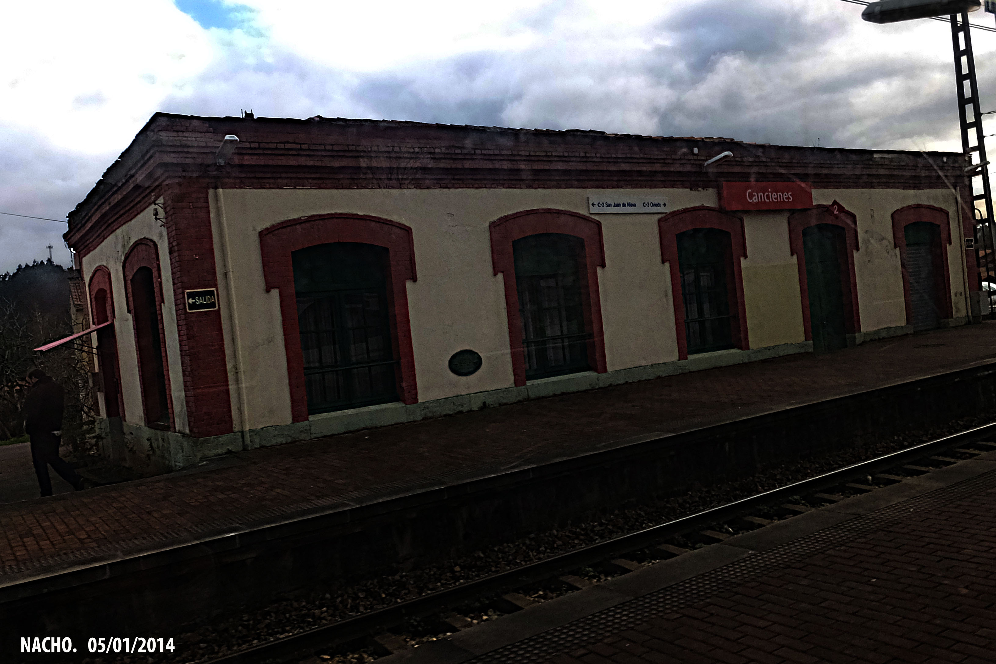 Estación de Cancienes (Villabona-San Juan de Nieva)